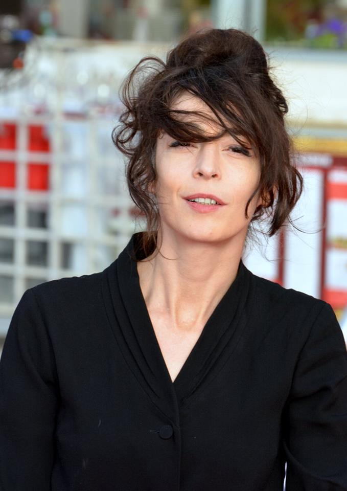 Adrienne Pauly au festival de Cabourg